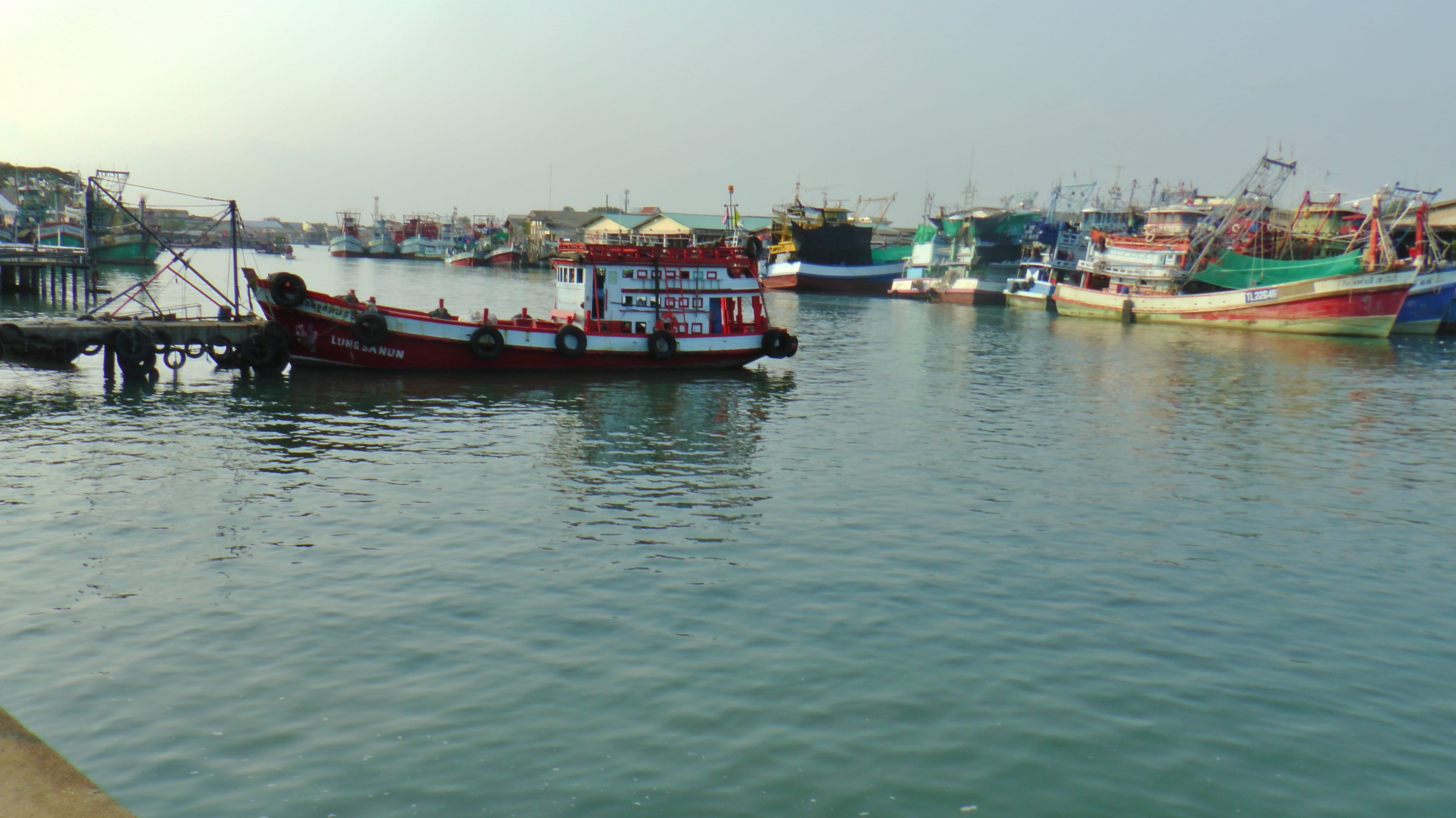 Blick vom südlichen Ufer des Rayong-Flusses nach Nordwest zum Hafen.